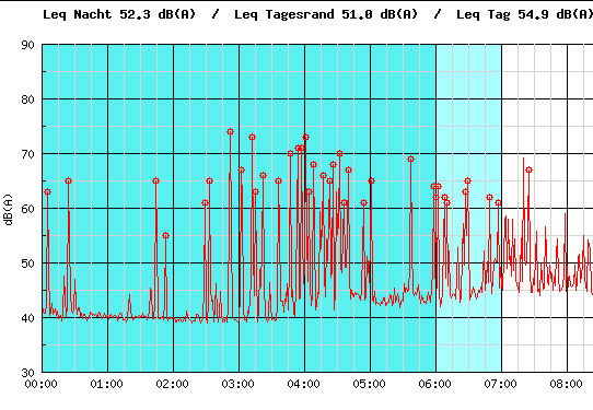 Ausschnitt einer Fluglärm-Messung einer privaten Lärm-Mess-Station (beim DFLD) während der Zeit 00:00 bis 08:00 Uhr (Nachtzeit: 22:00-06:00 Uhr).